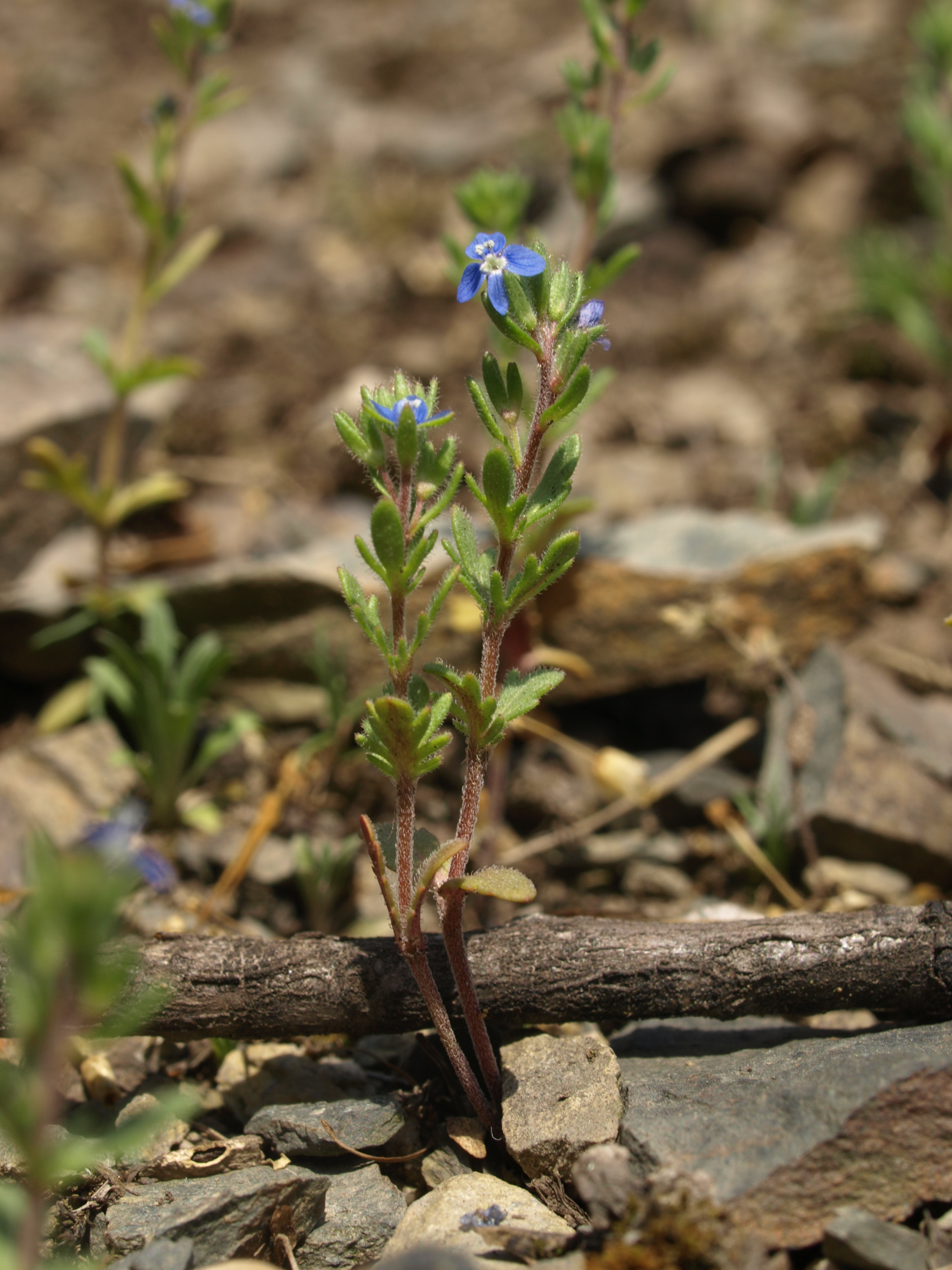 Sedlecká skály (přírodní pamtáka) - jaro - Veronica dillenii Crantz, rozrazil Dillenův - C4a (vzácnější taxony vyžadující pozornost)